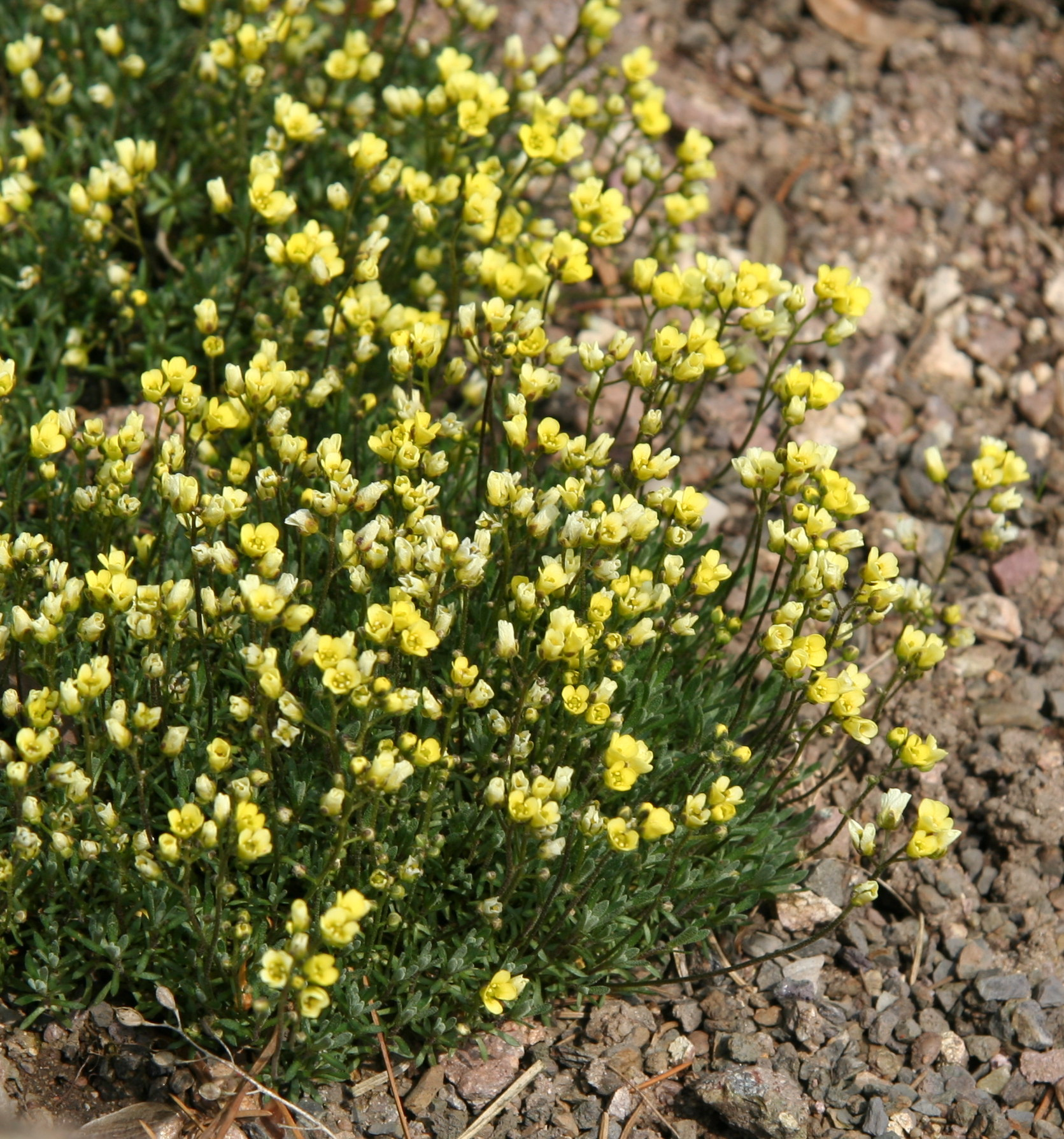 Draba oligosperma im Botanischen Garten Dresden